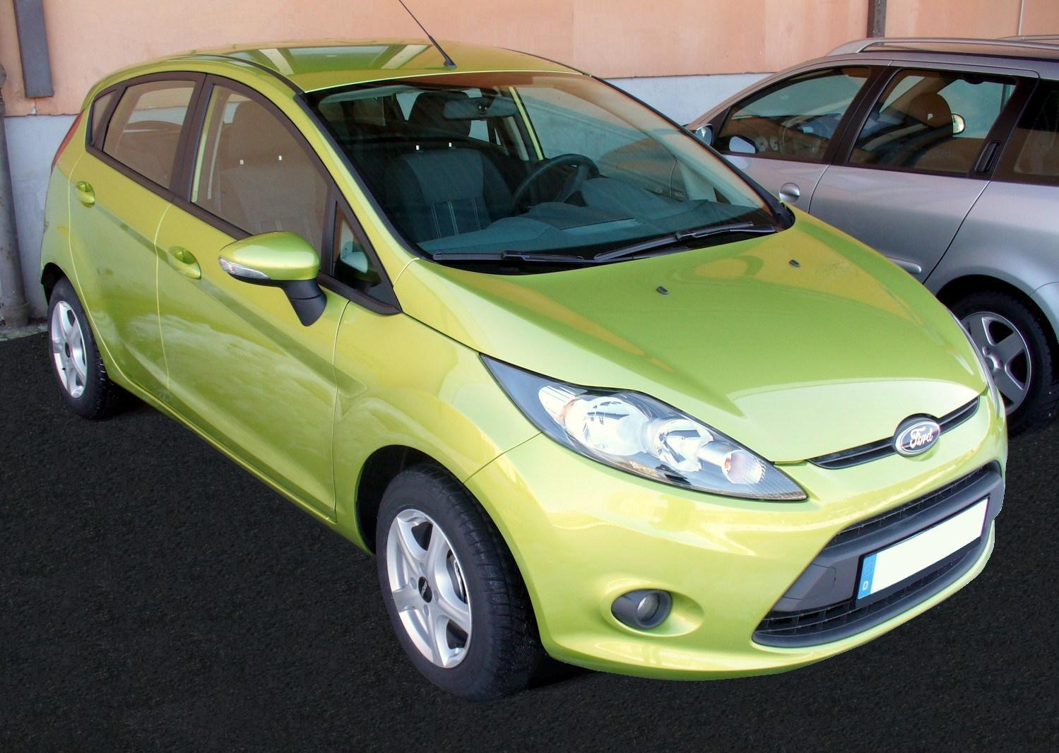 Ford Fiesta Mk6